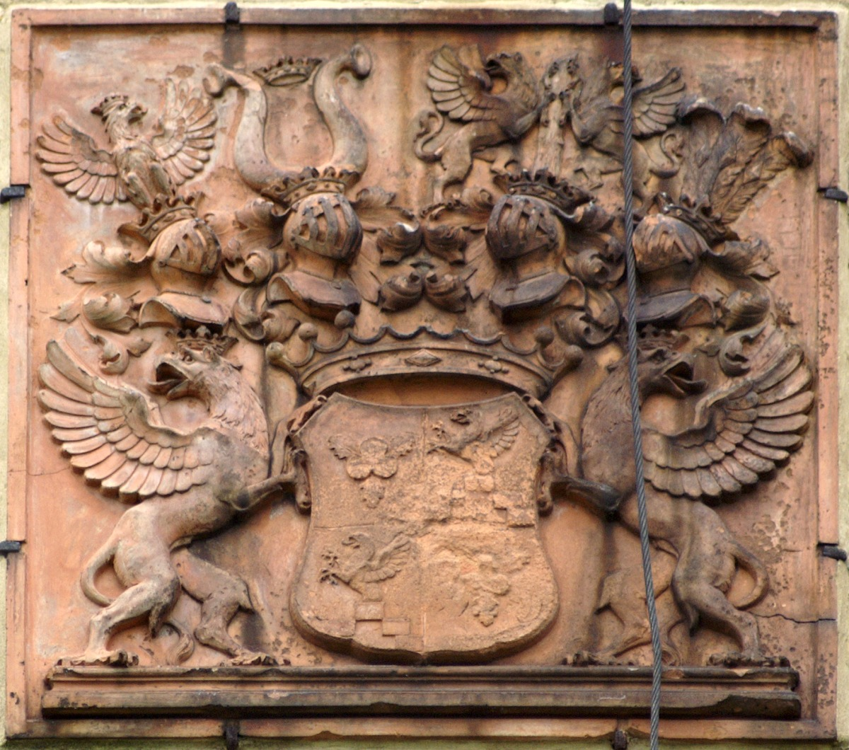 Karlsburg (Landkreis Vorpommern-Greifswald) - Ortsteil Steinfurth - Grabkapelle - Wappenstein der Familie von Bismarck-Bohlen